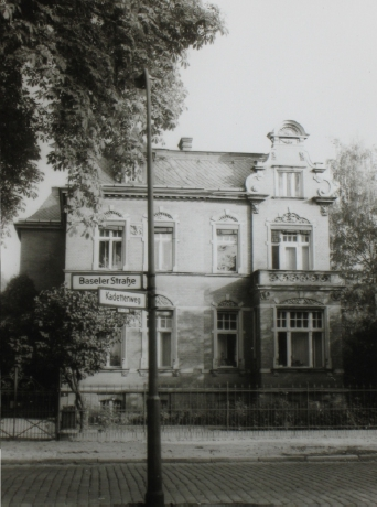 Haus der Familie Johannes Stroux und Paula Stroux-Speiser etwa 1935 in Berlin-Lichterfelde